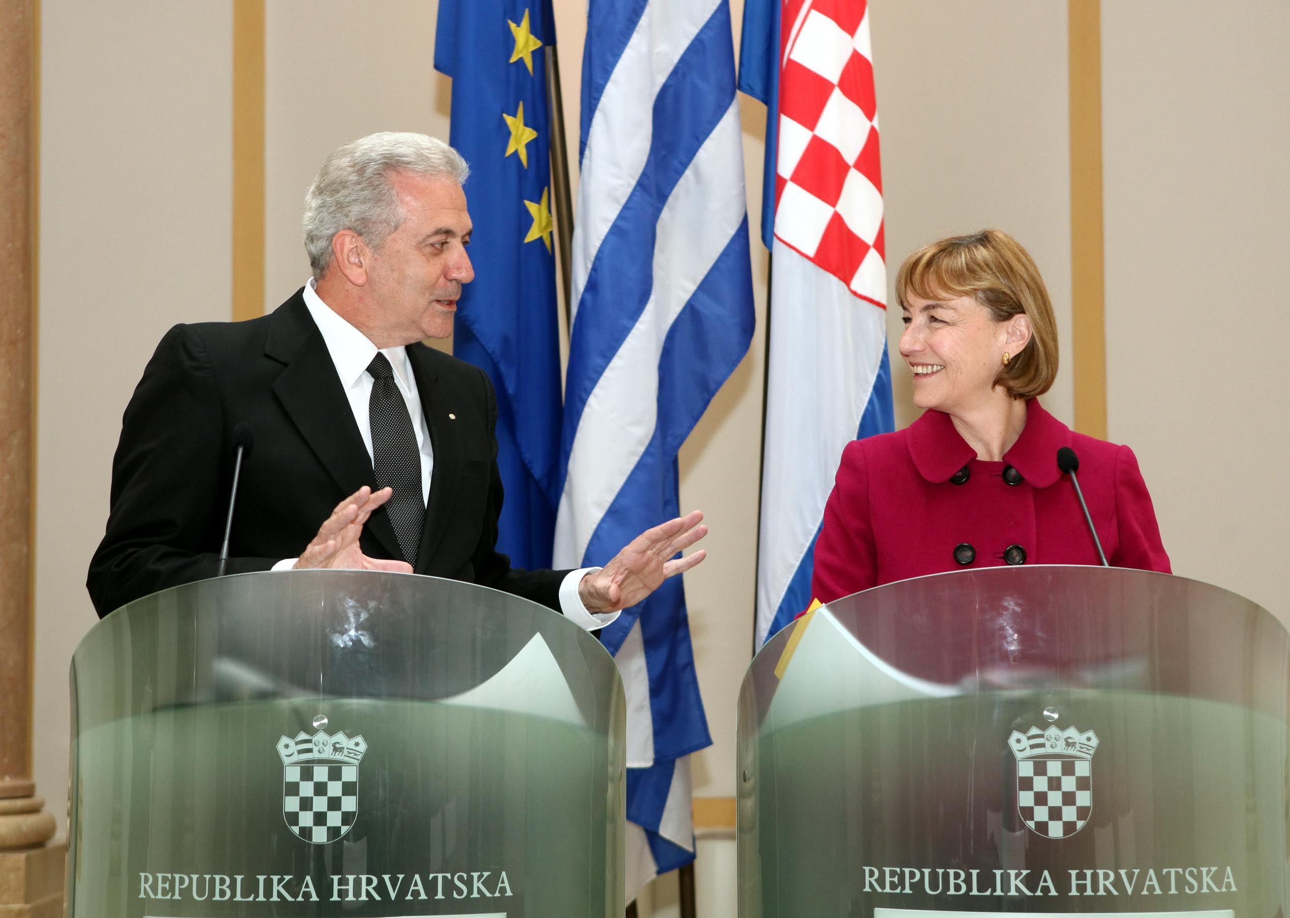 Ο Υπουργός Εξωτερικών Δημήτρης Αβραμόπουλος είχε διμερείς διαβουλεύσεις με την ομόλογό του Υπουργό Εξωτερικών της Κροατίας κα Vesna Pusić (05.04.2013).